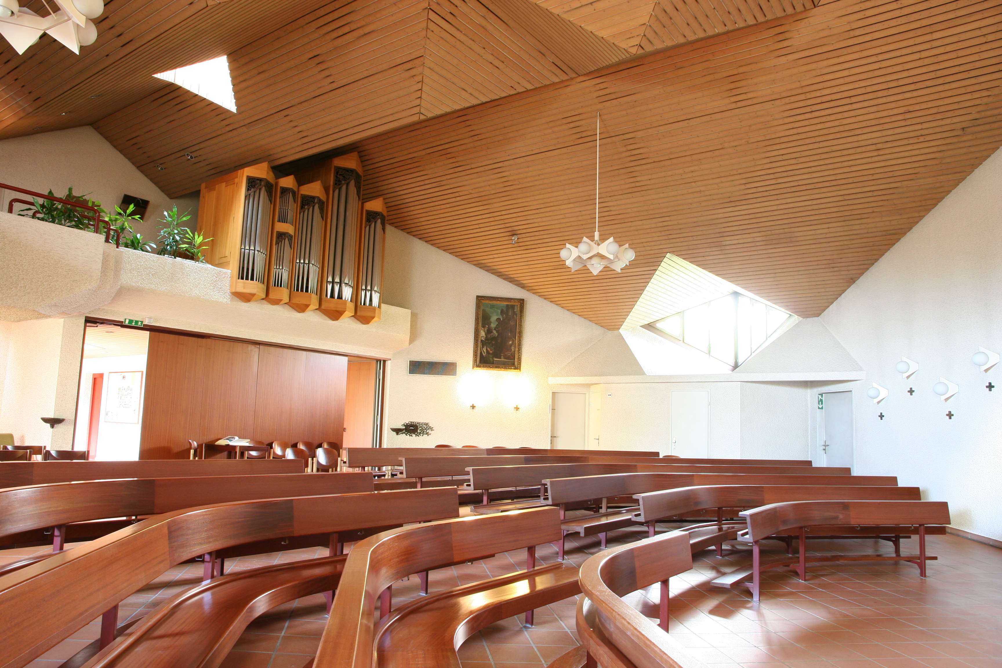 Römisch-katholische Kirche St. Nikolaus Rüschlikon, Blick gegen Norden